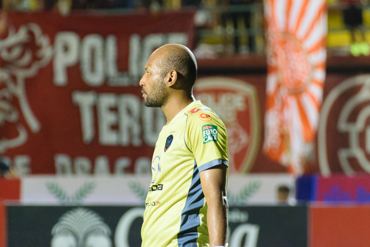 Samuel Cunningham